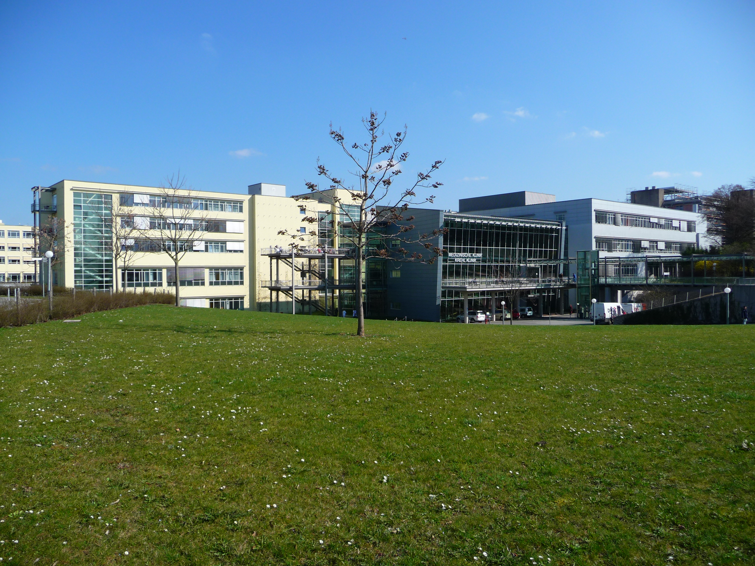 Haupteingang der Medizinischen Klinik / Krehl-Klinik des Universitätsklinikums in Heidelberg